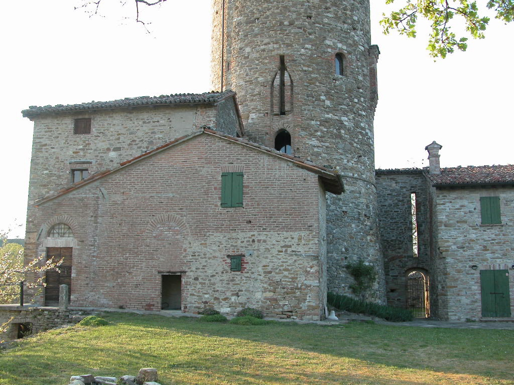 Foto mia personale, l'arco d'ingresso al castello di Monteventano, 2006